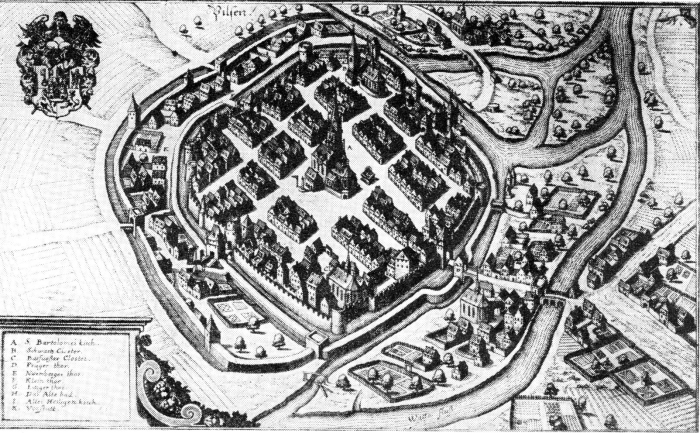 Plzeň v 17. století